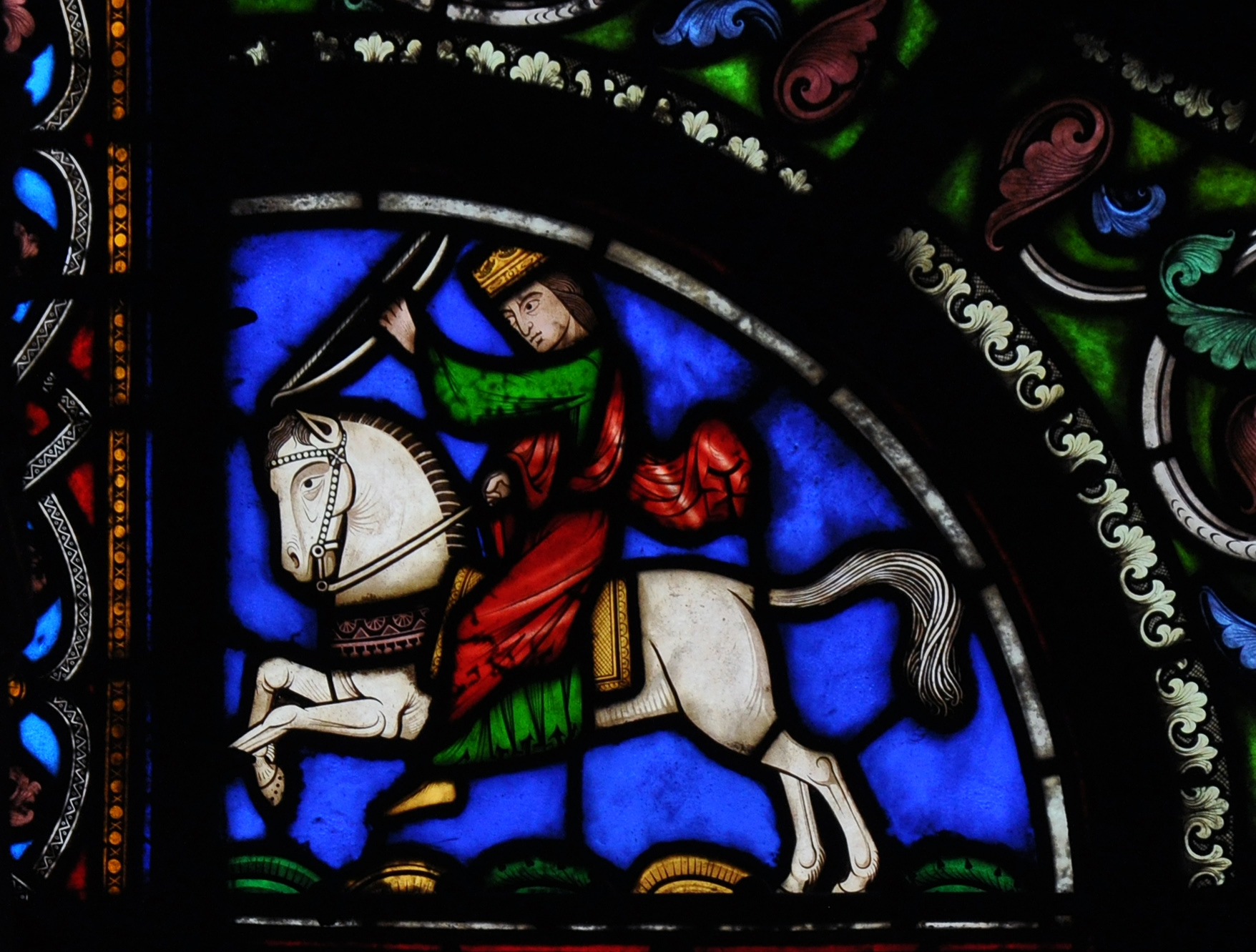 Vitrail de la Basilique Saint-Denis (chapelle Saint Cucuphas).Vitrail de l'Apocalypse: le premier cavalier (Apocalypse 6-2). Viollet-le-Duc et Alfred Gérente, 1854.